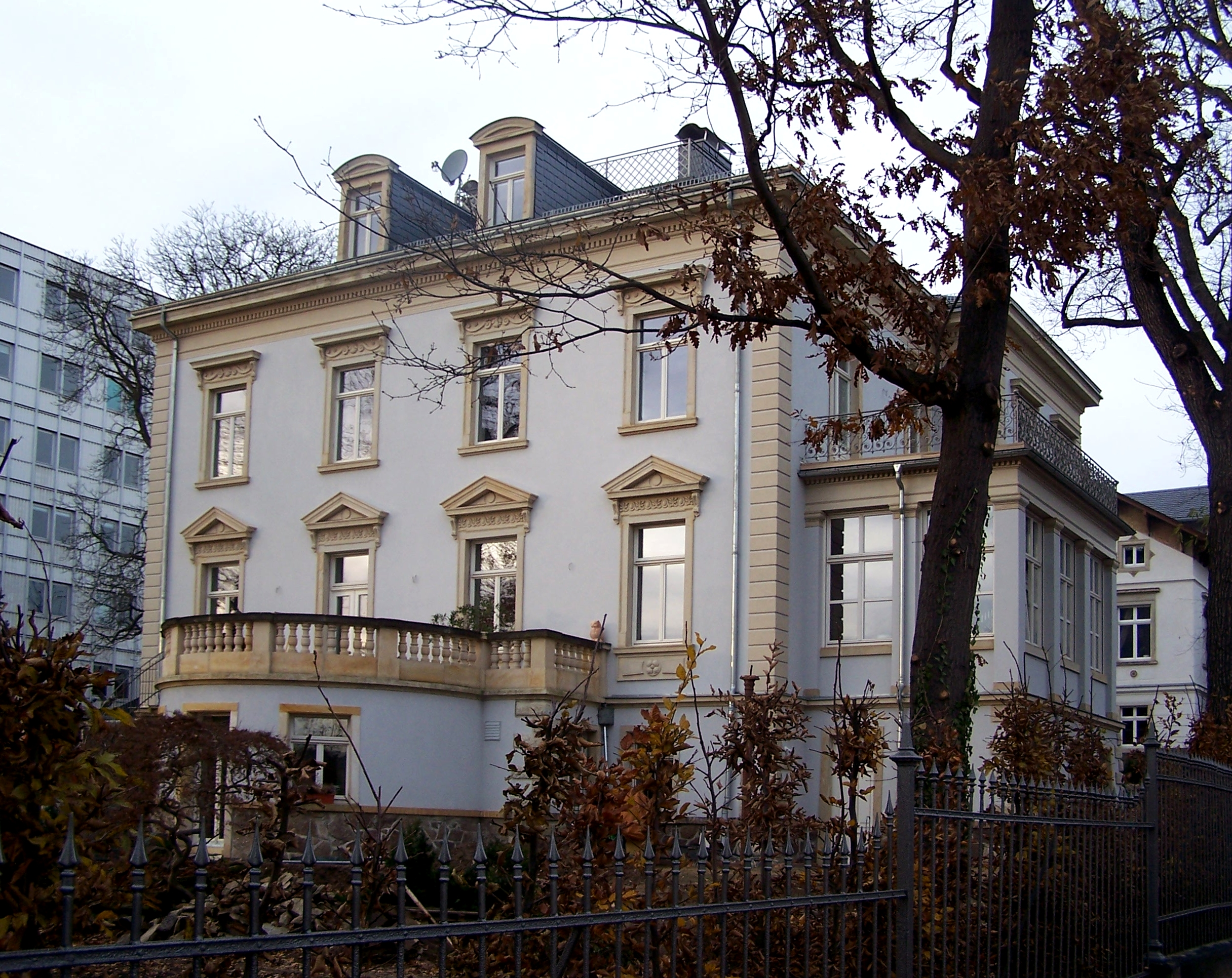 Schumannstr. 3 in Radebeul